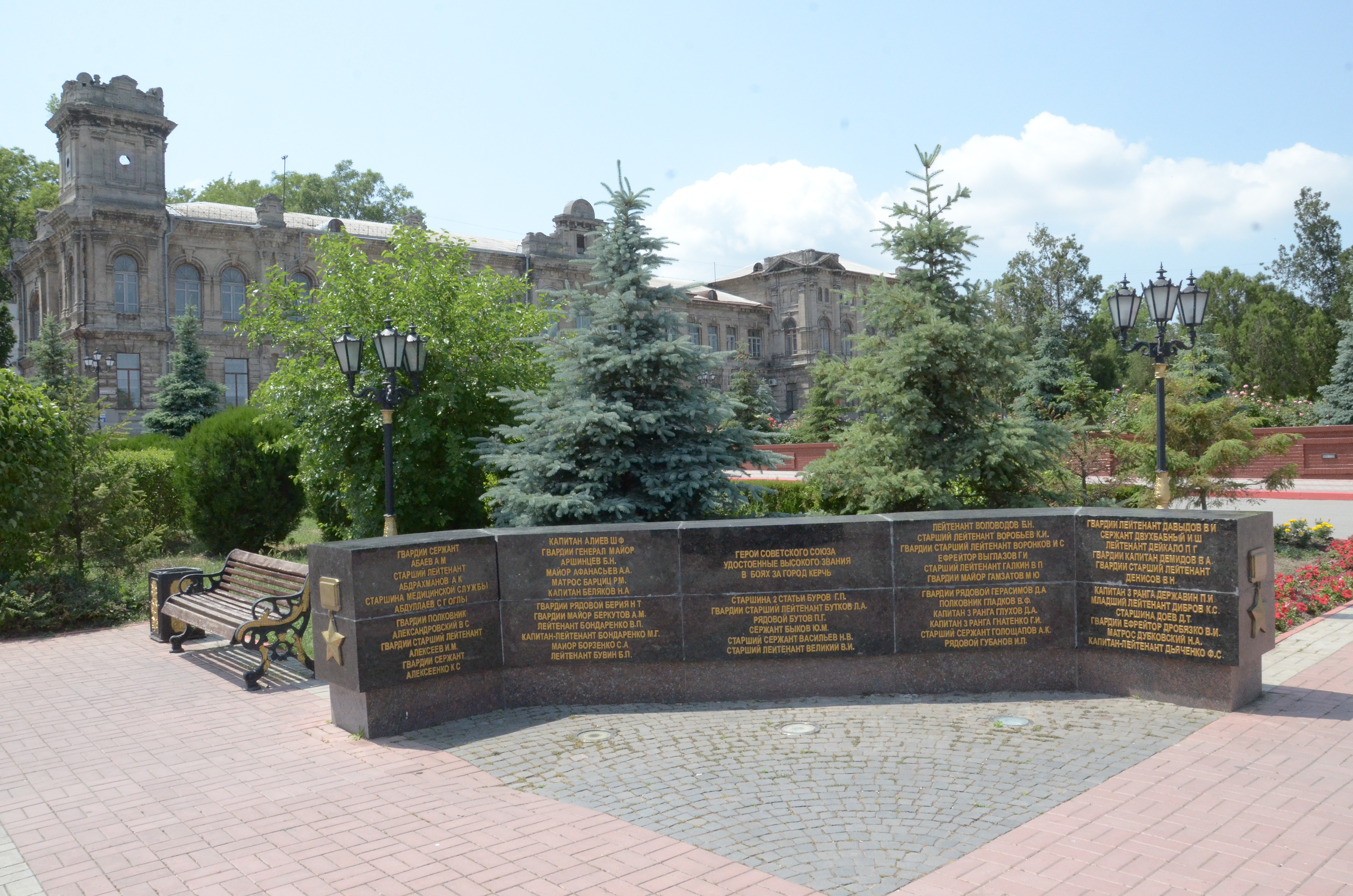 Керчь